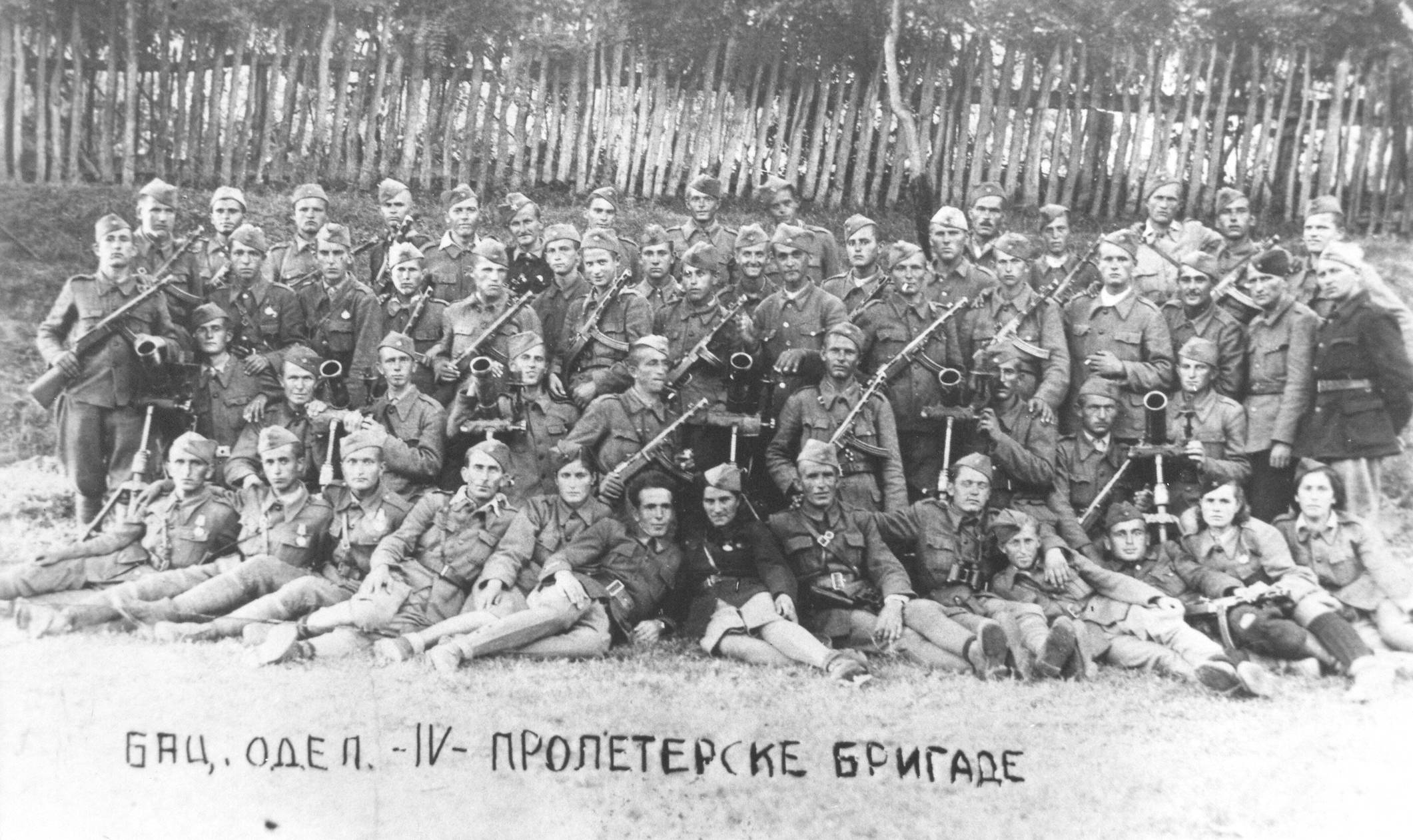 Partigiani della Quarta brigata proletaria d'assalto montenegrina nel 1944